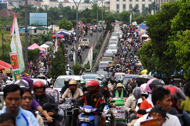 Pasar Tumpah Jalan Juanda Depok